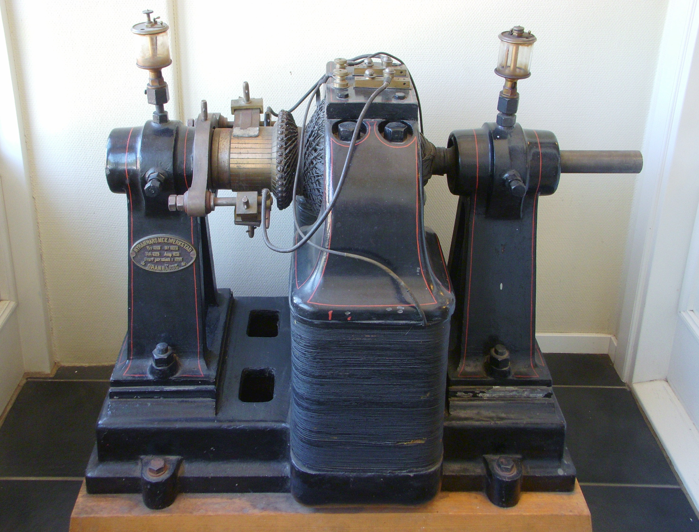 Likströmsgenerator konstr. av Johannes Gustaf Darell och tillverk. på Nyhammars bruk